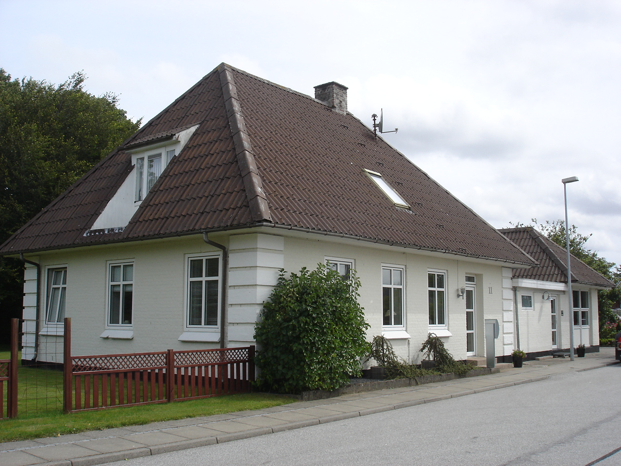 Thorshøj Station